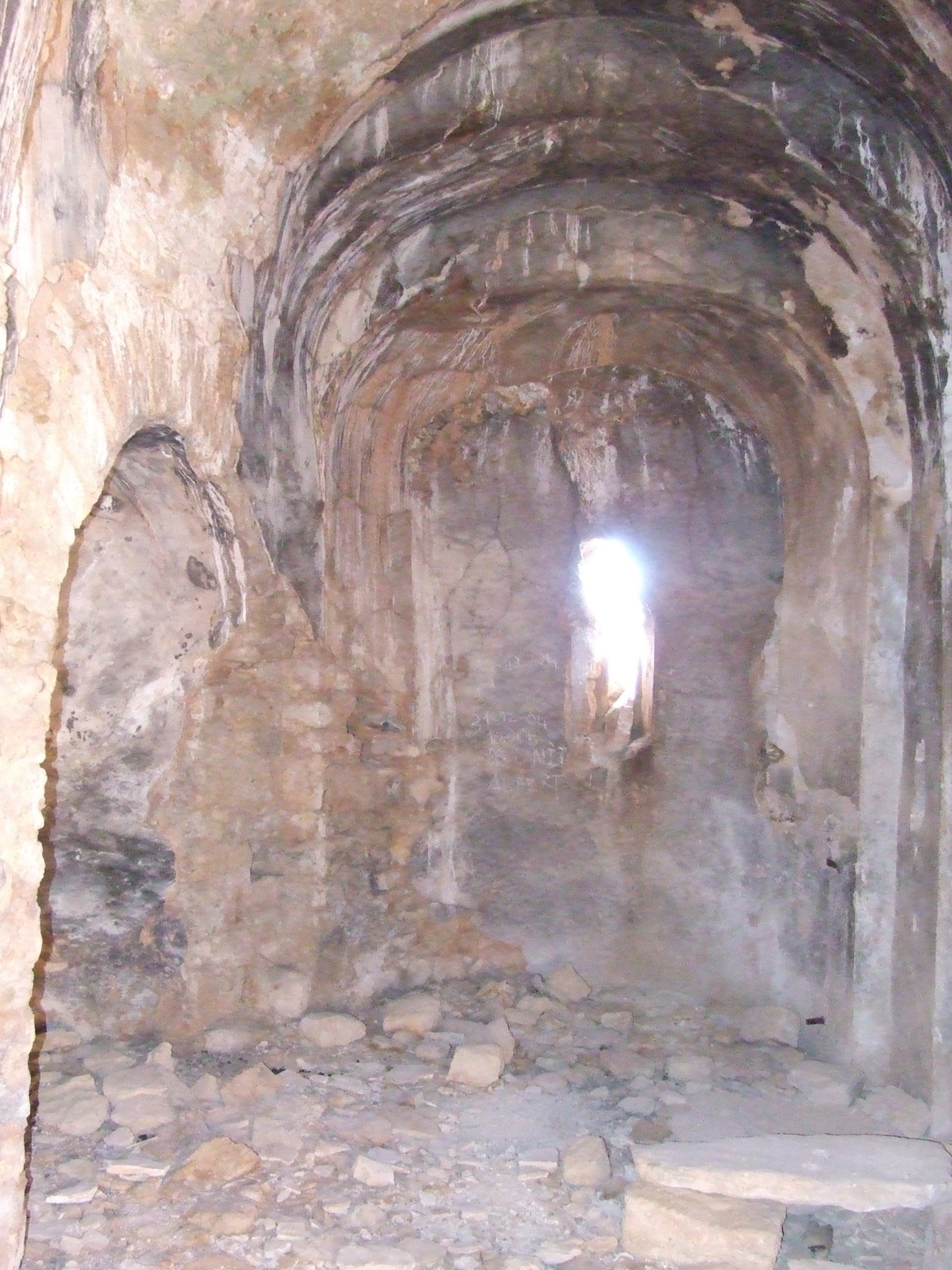 Església de Santa Anna de Montadó (Benavent de la Conca, Isona i Conca Dellà, Pallars Jussà)